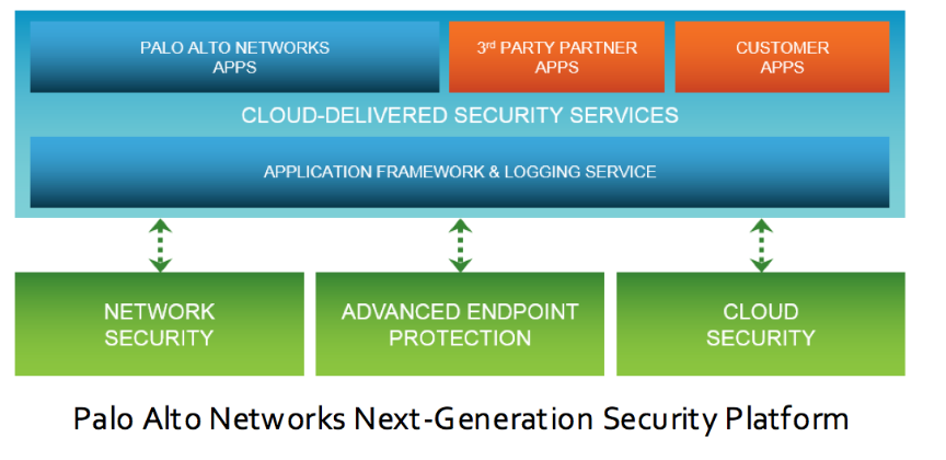 Монгол: Palo Alto сүлжээний дараагийн үеийн аюулгүй байдлын платформ